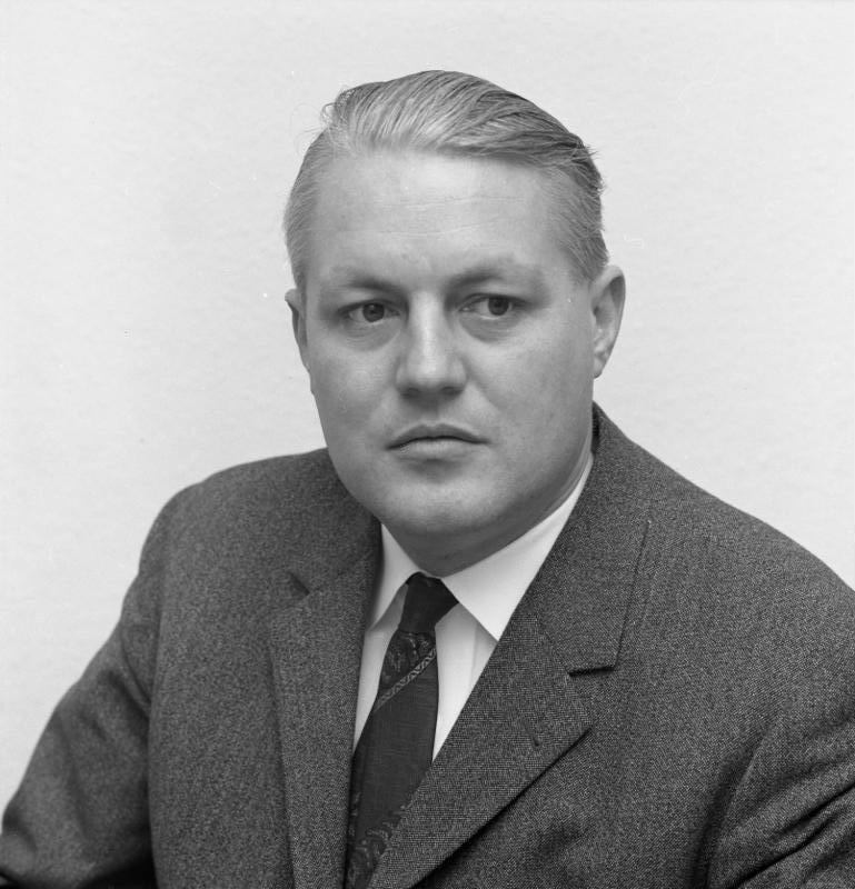 MdB Dr. Gerhard Stoltenberg, Portrait